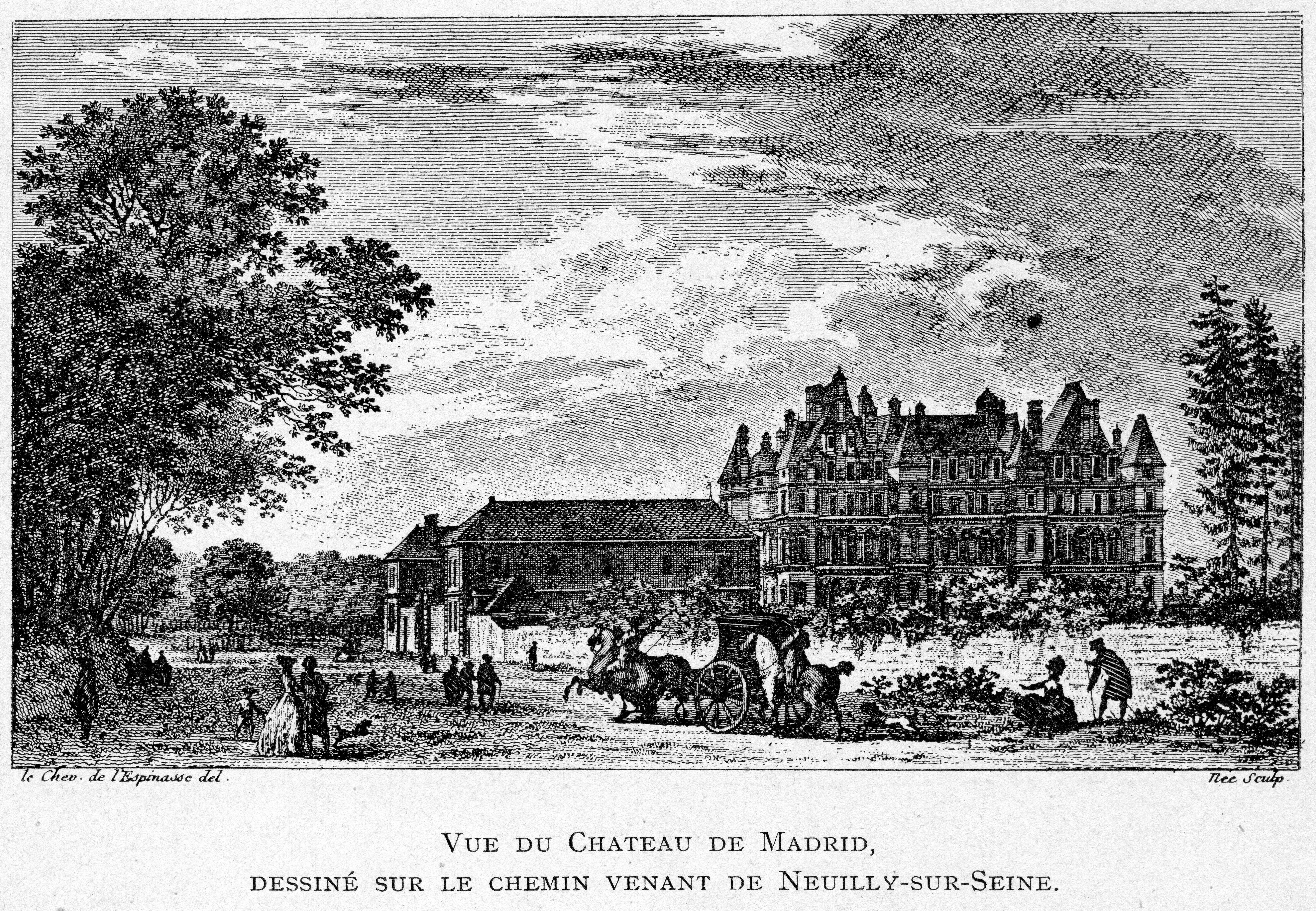 Corbel010 Vue du château de Madrid, dessiné sur le chemin venant de Neuilly-sur-Seine